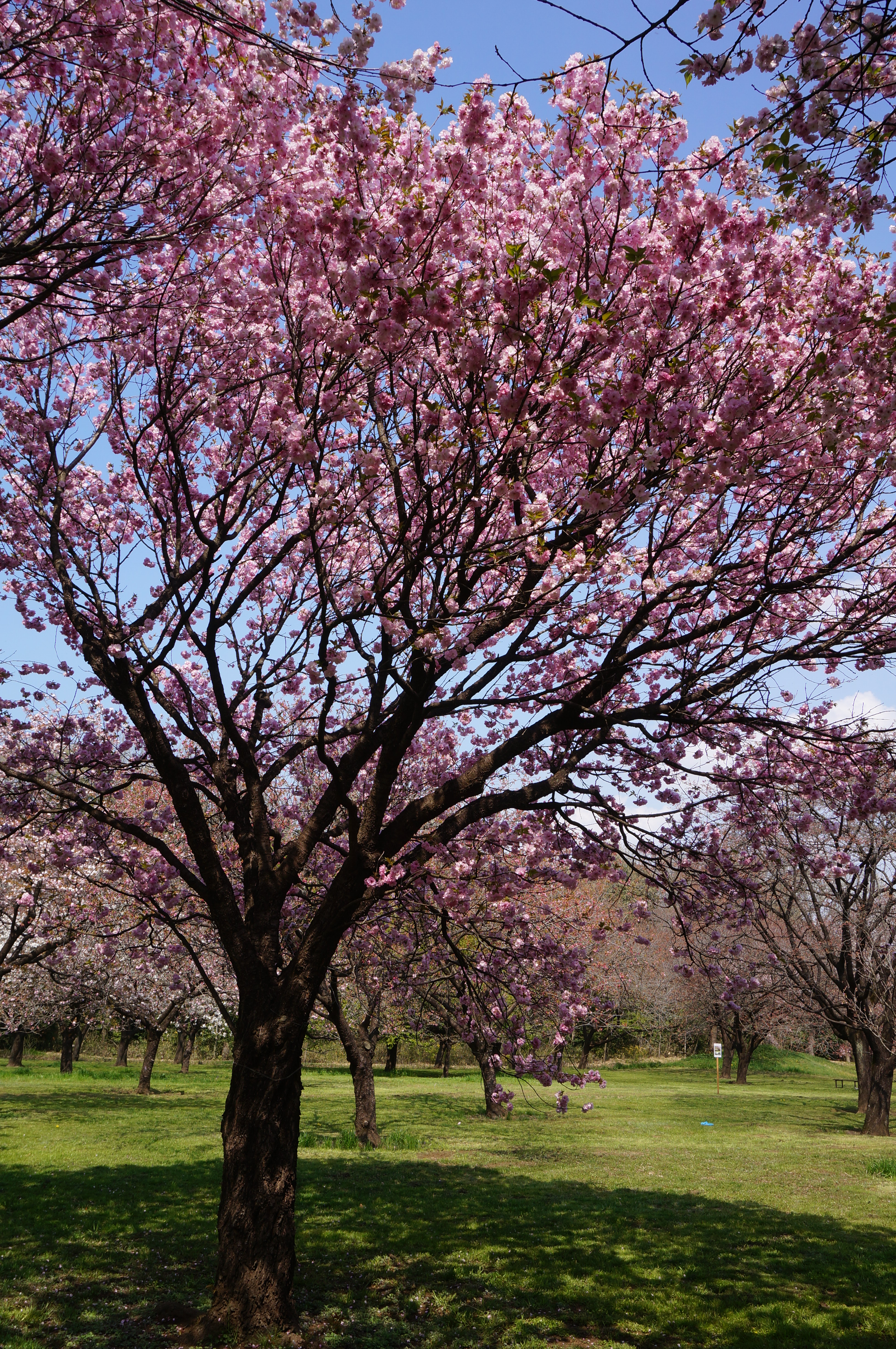 ベニユタカ（日本花の会 結城農場にて）